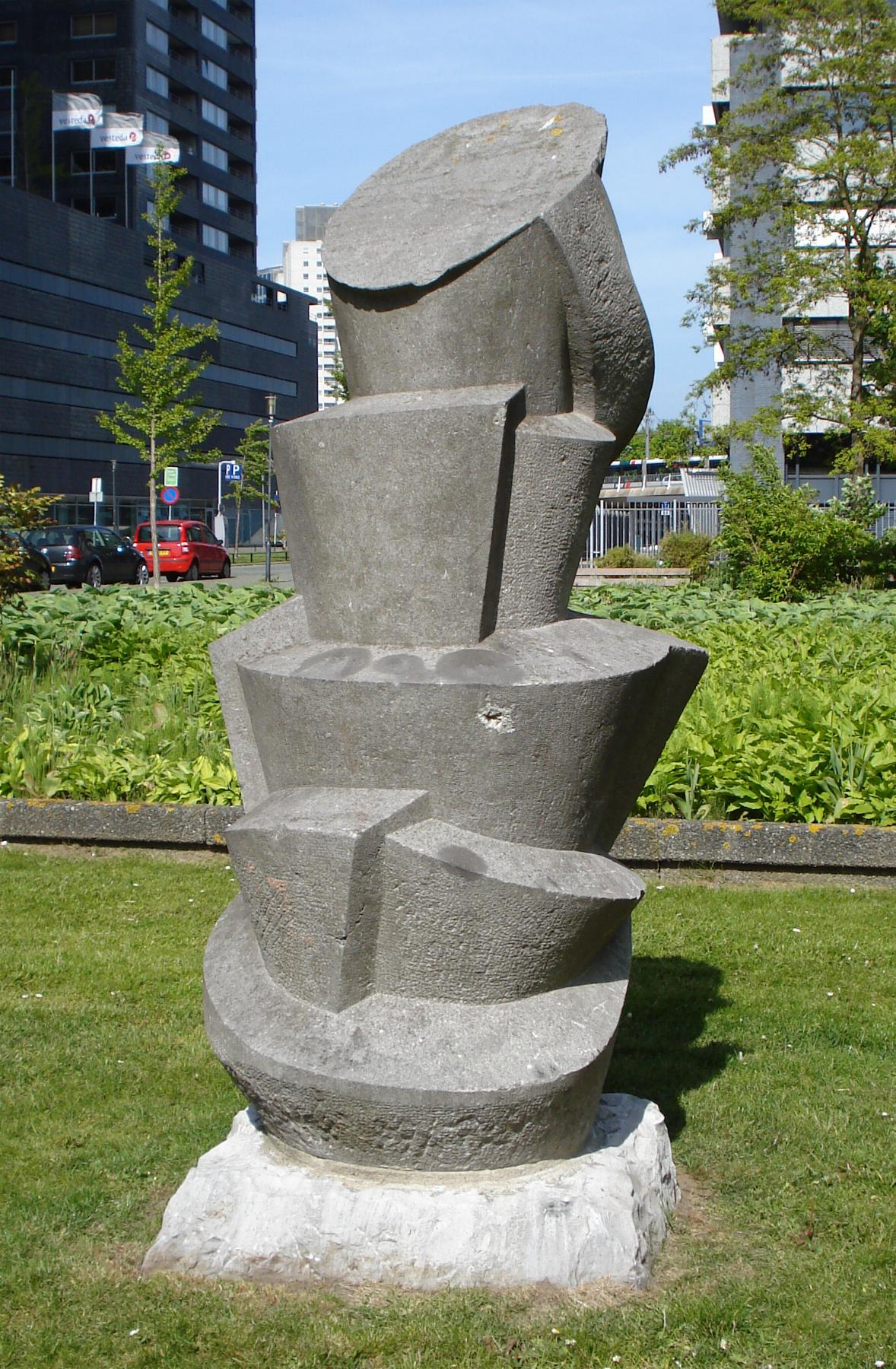 Rotterdam, Gedempte Zalmhaven. Kunstwerk zonder titel van Piet van Stuyvenberg. Rotterdam/The Netherlands.